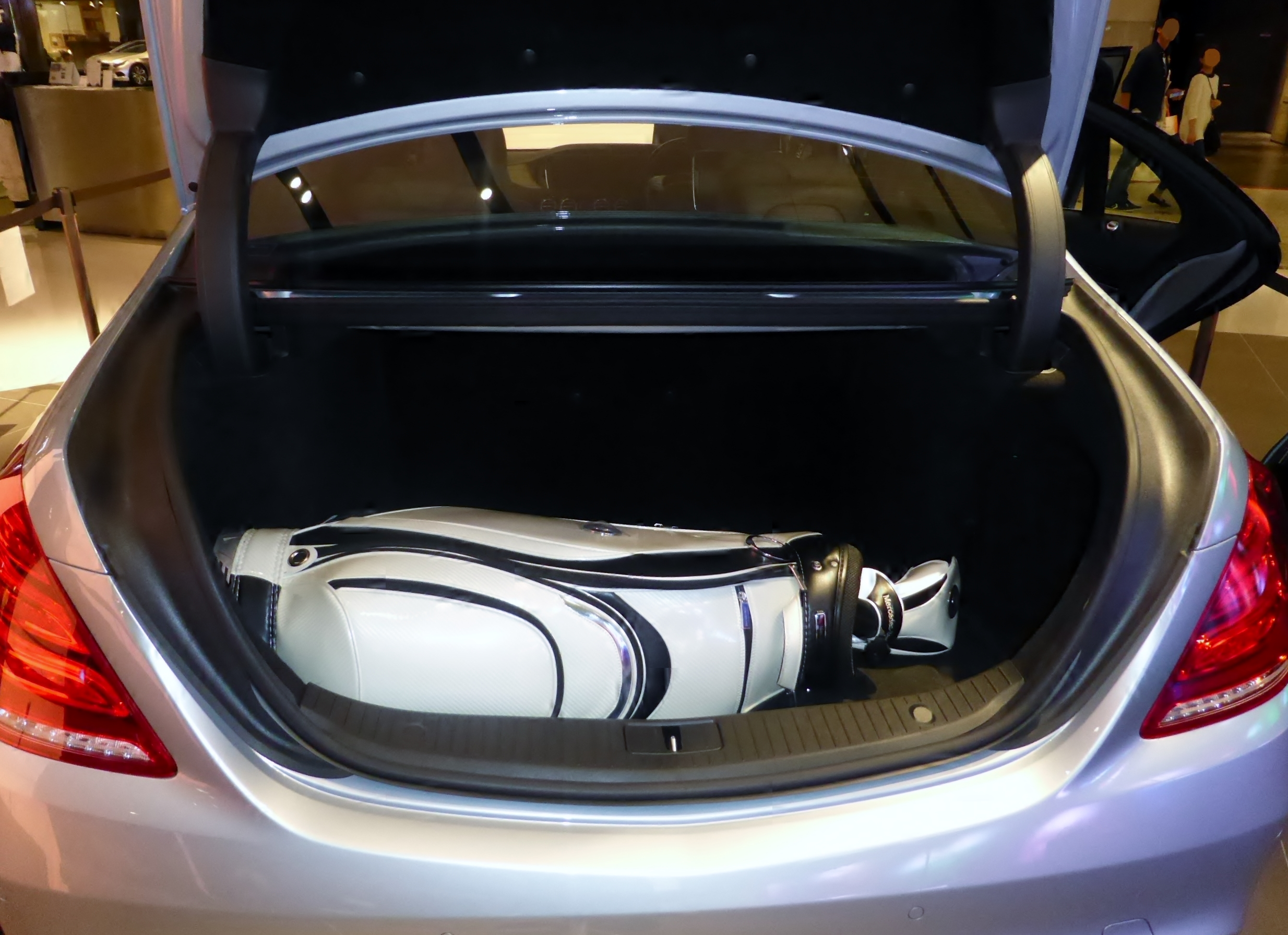 W222型メルセデス・ベンツS400ハイブリッドのトランクルームを撮影。